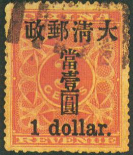 發行逾百年屬自由版權之大清郵票-紅印花小壹圓舊票